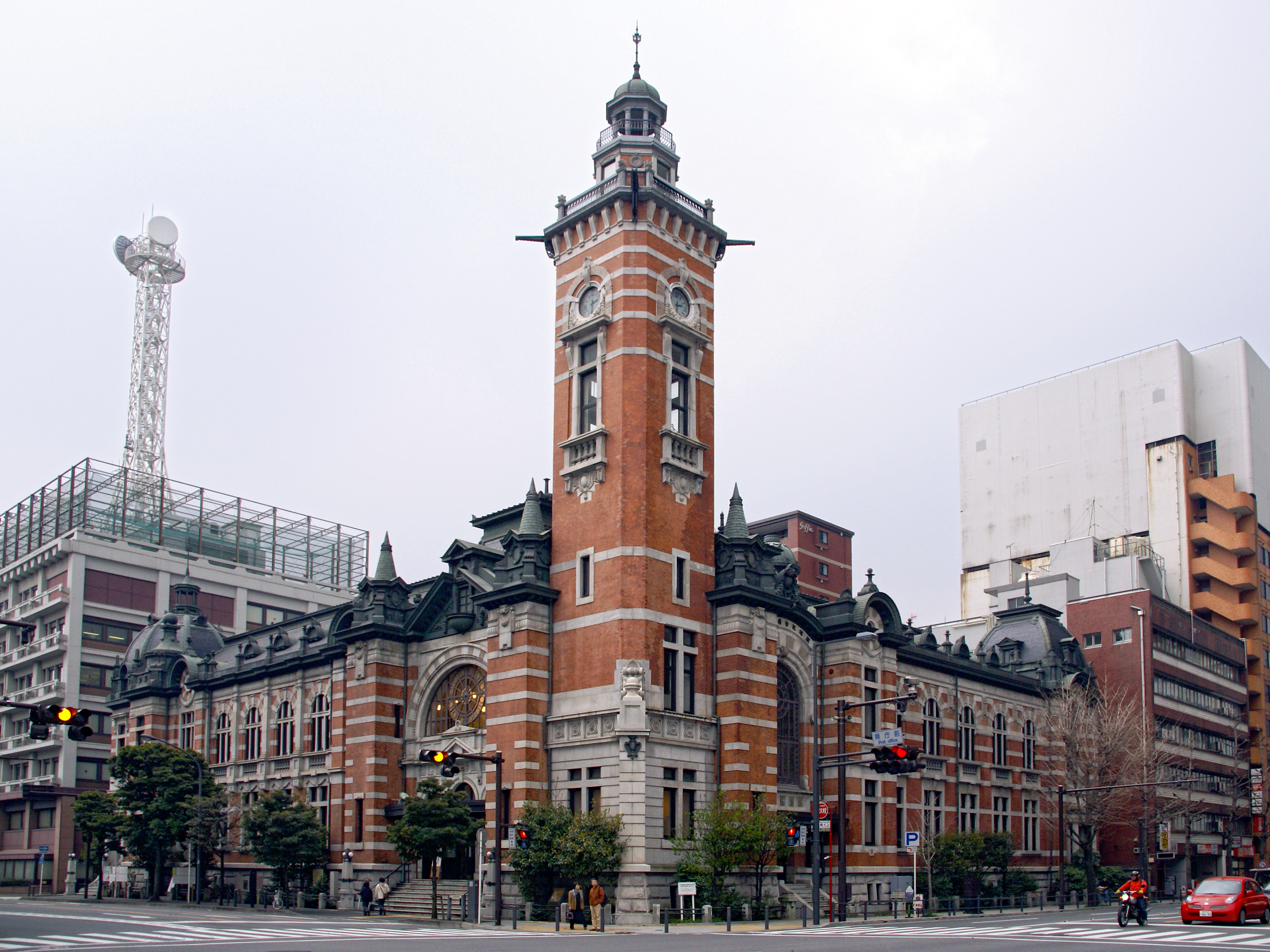 Yokohama Port Opening Memorial Hall in Yokohama, Japan